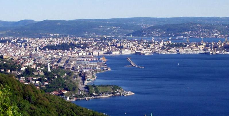 Panorama di Trieste